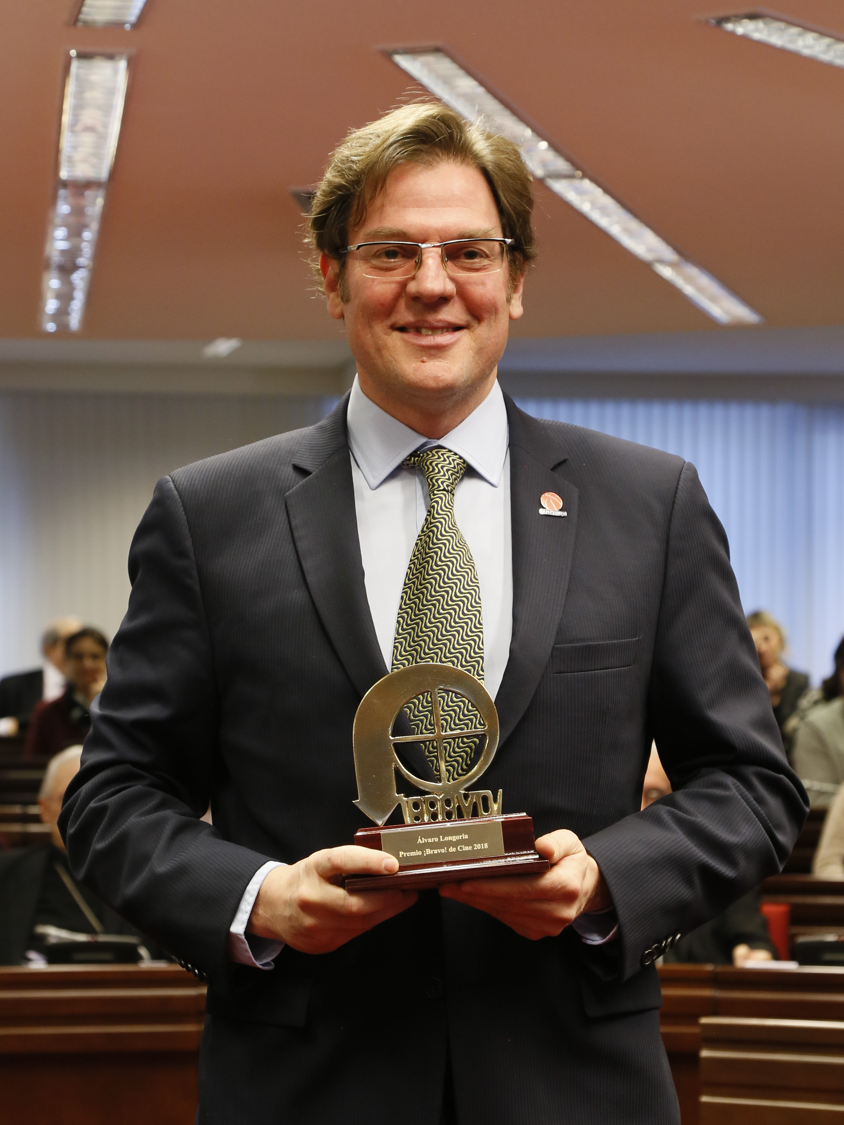 Entrega de los Premios ¡Bravo! 2018